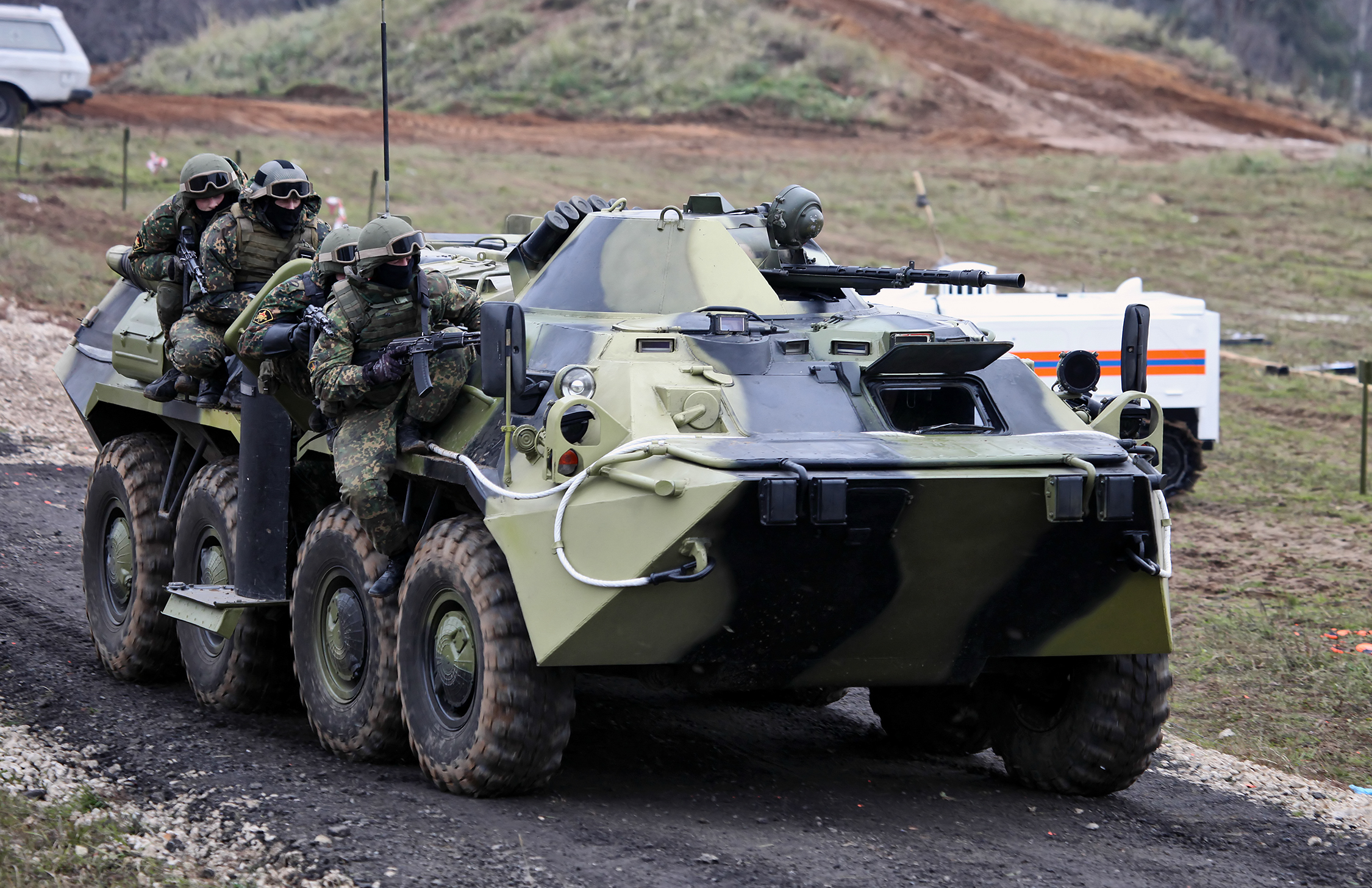 Основная группа 604-го ЦСН ВВ МВД России подходит под прикрытием БТР-80 (The second assault group from 604th Special Purpose Center of Internal troops was moving to the building under cover of BTR-80)